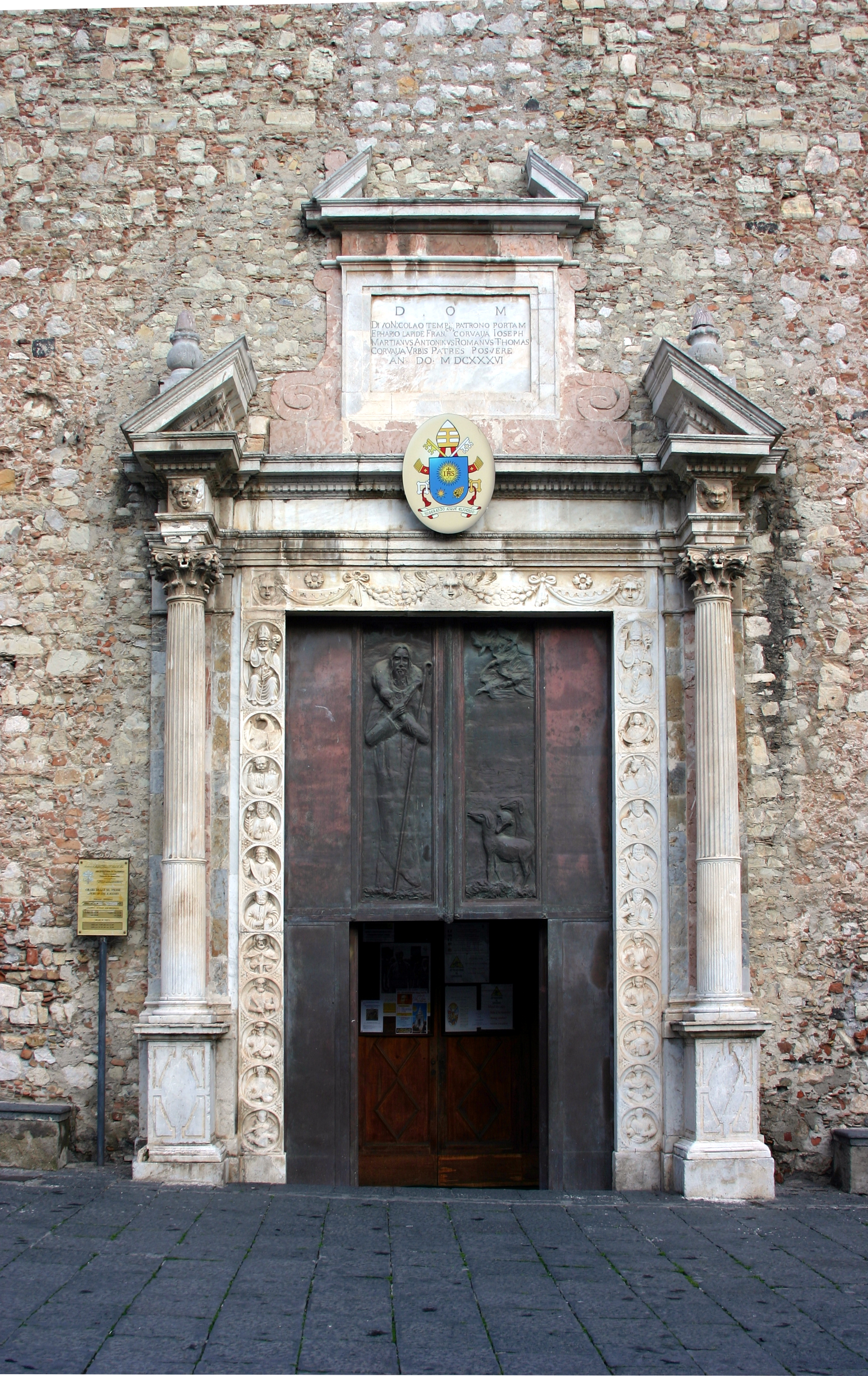 Taormina